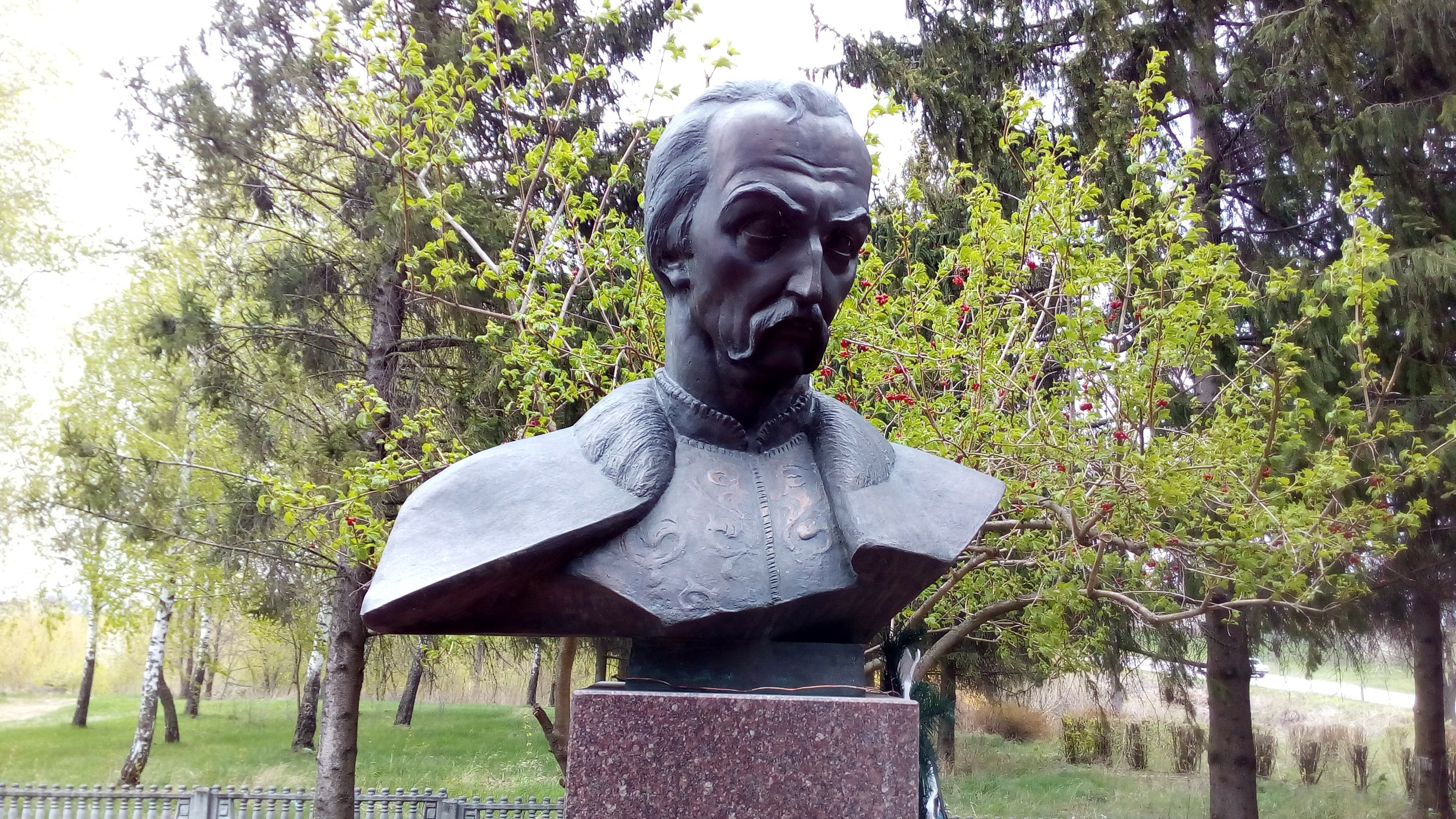 Пам'ятник Мазепі у селі Мазепинці